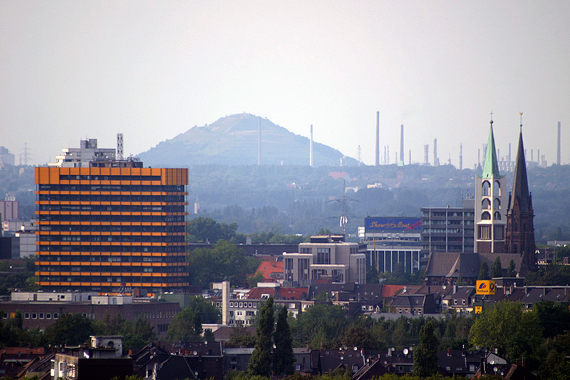 Blick auf Gelsenkirchen von der „Himmelstreppe“. Zu sehen ist im Vordergrund die Innenstadt (Altstadt), im Hintergrund die Schornsteine der VEBA-Raffinerien im Stadtteil Scholven sowie die Bergehalde Scholven.